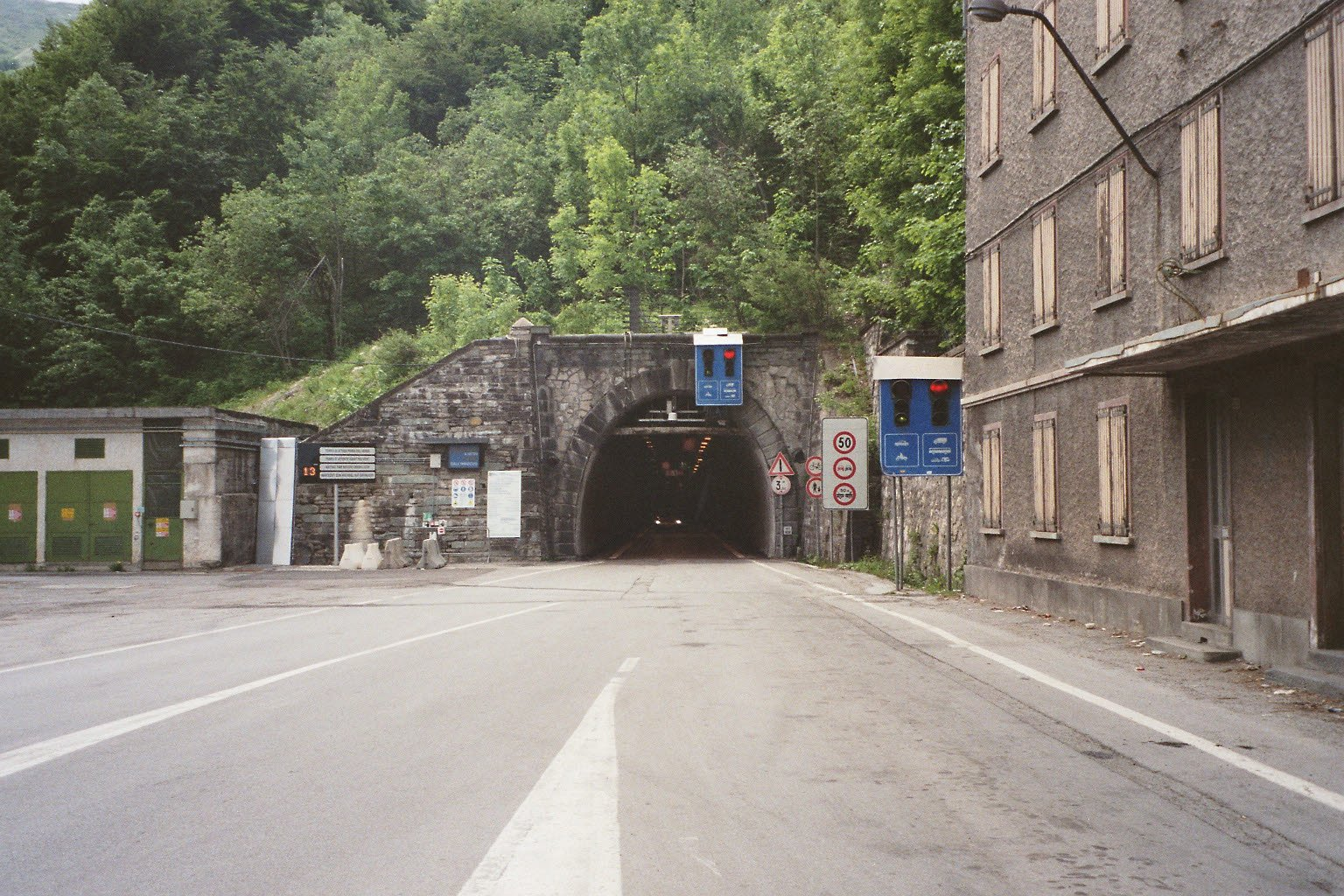 Der Straßentunnel unter dem Colle di Tenda auf der italienischen Seite.